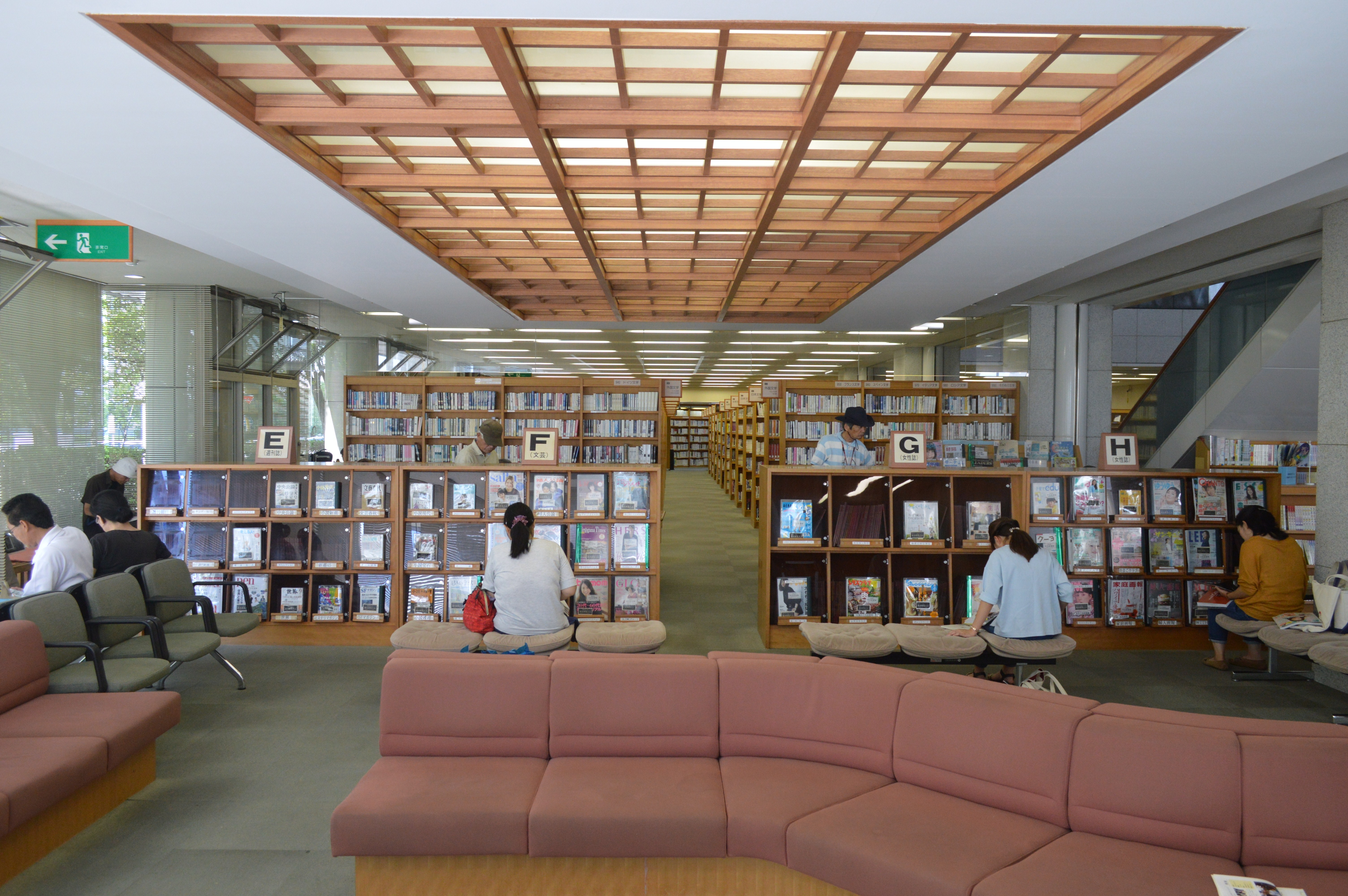 安城市城南町の安城市中央図書館1階。